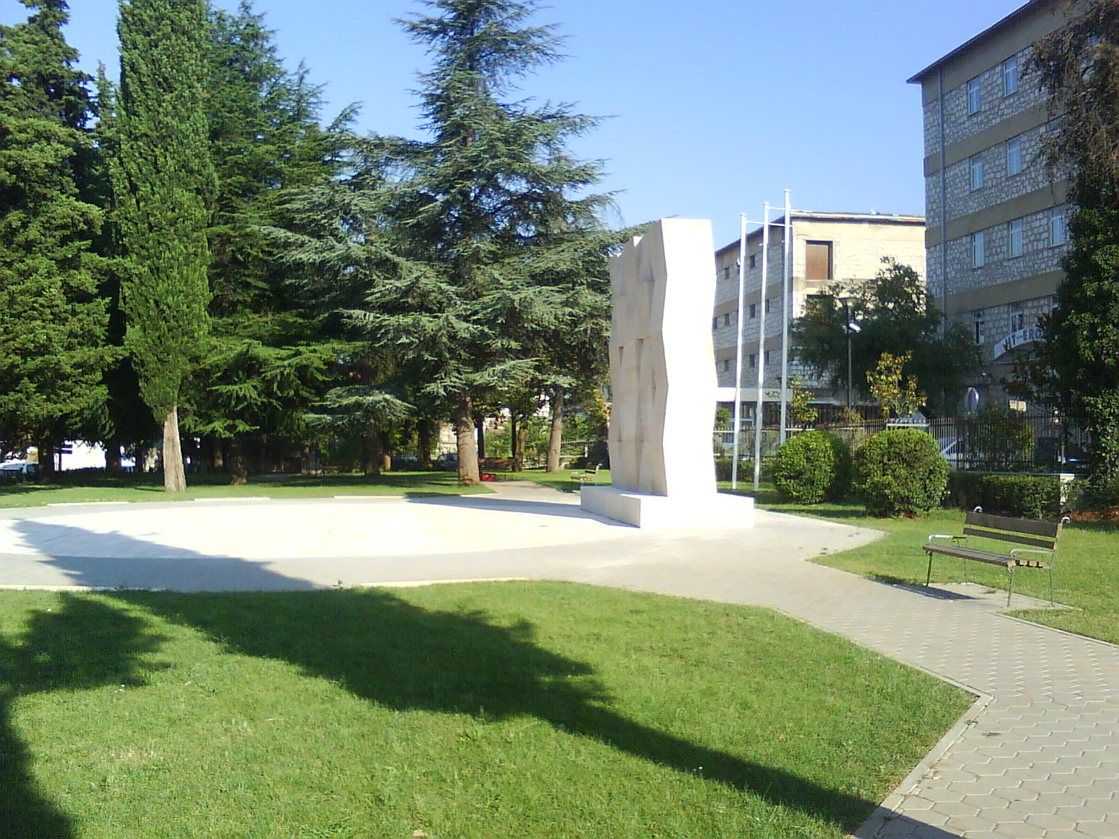 Park hrvatskih velikana u Grudama